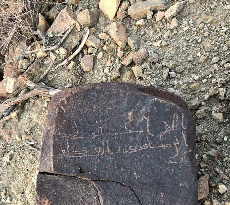 نقش اثري لمحمد بن مسافر وكتب فيه : اللهم اغفر لمحمد بن مسافر ذنبه العظيم